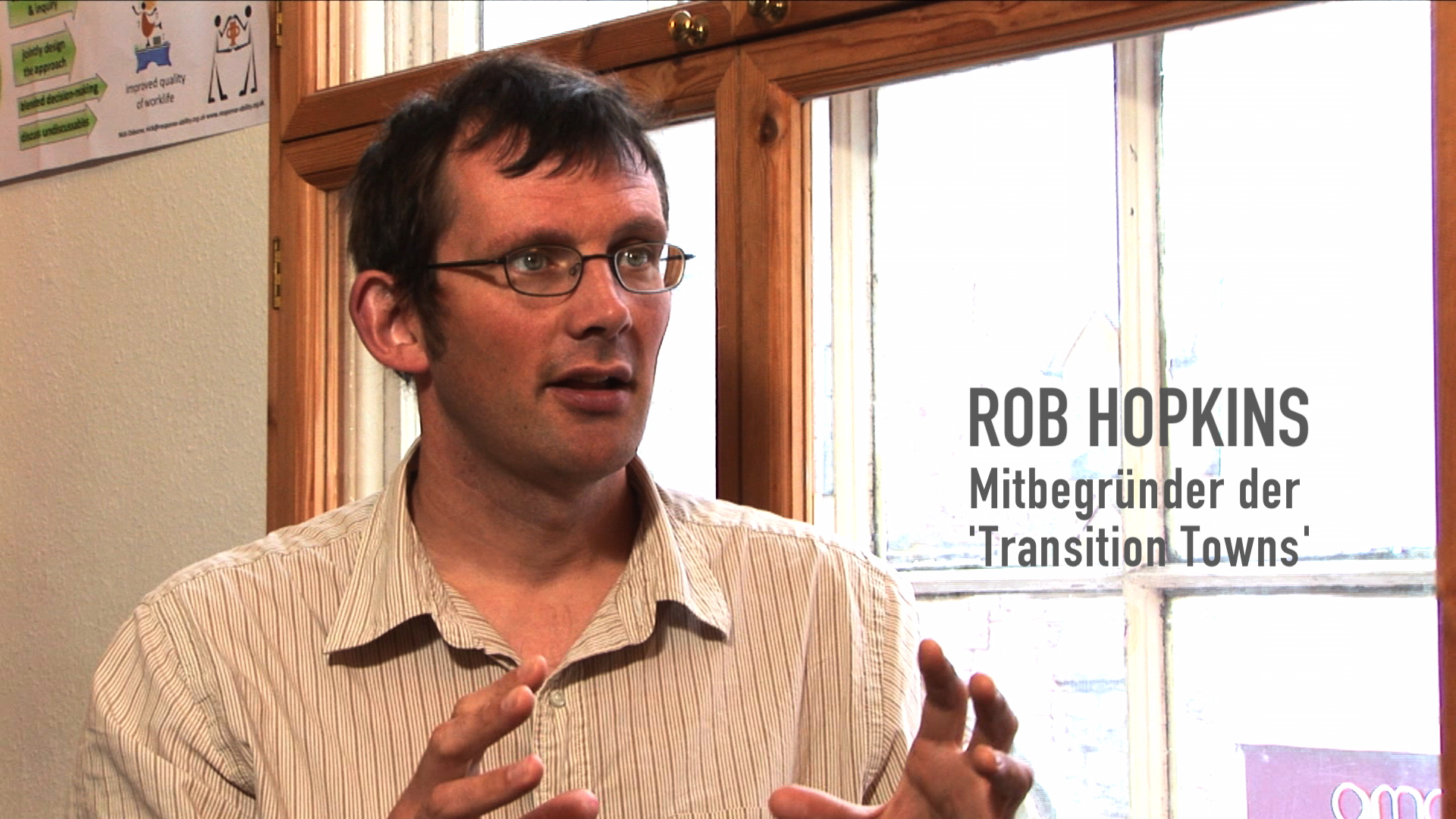 Rob Hopkins, Screenshot aus dem Film Voices of Transition